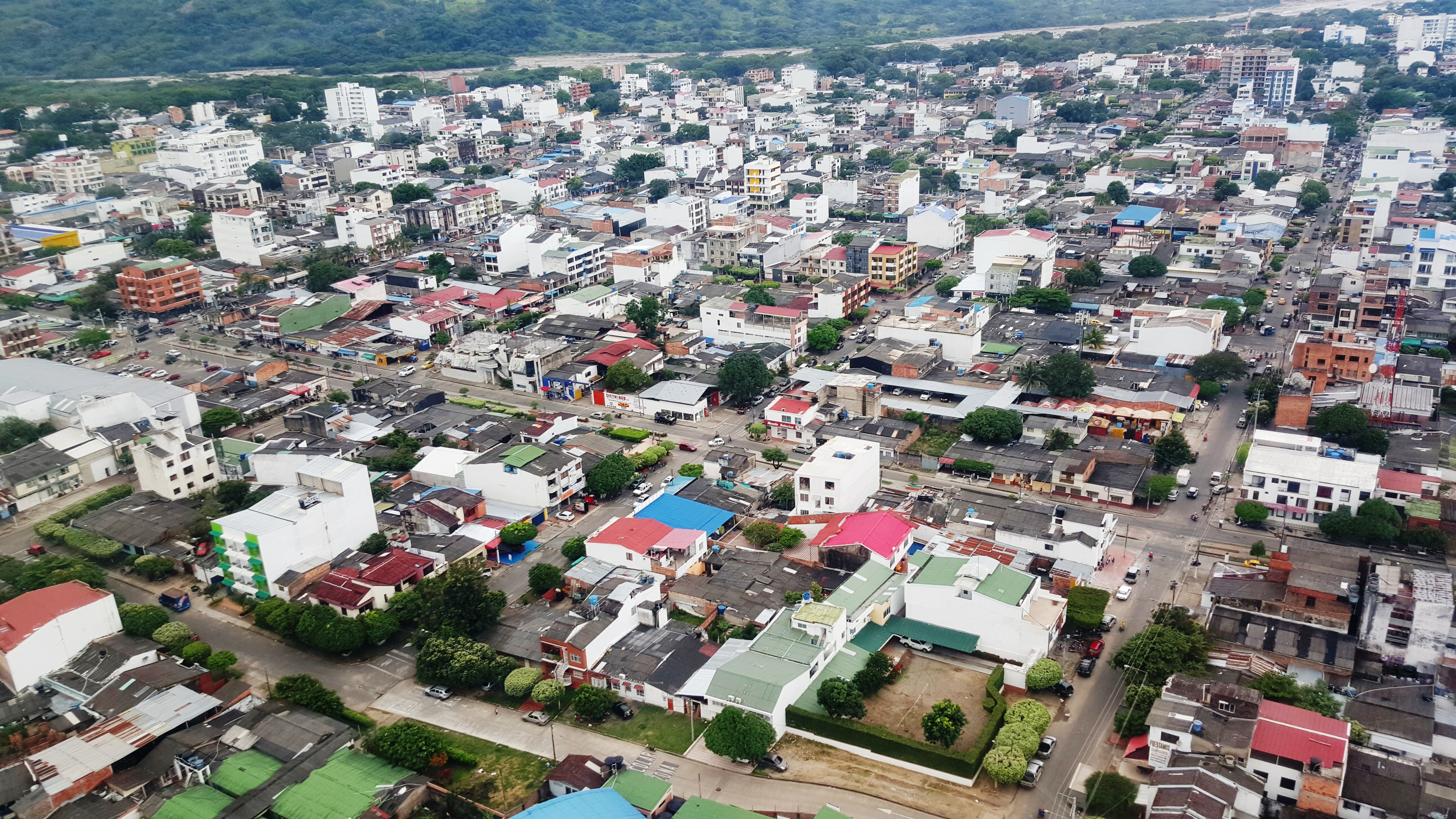 Yopal, Casanare